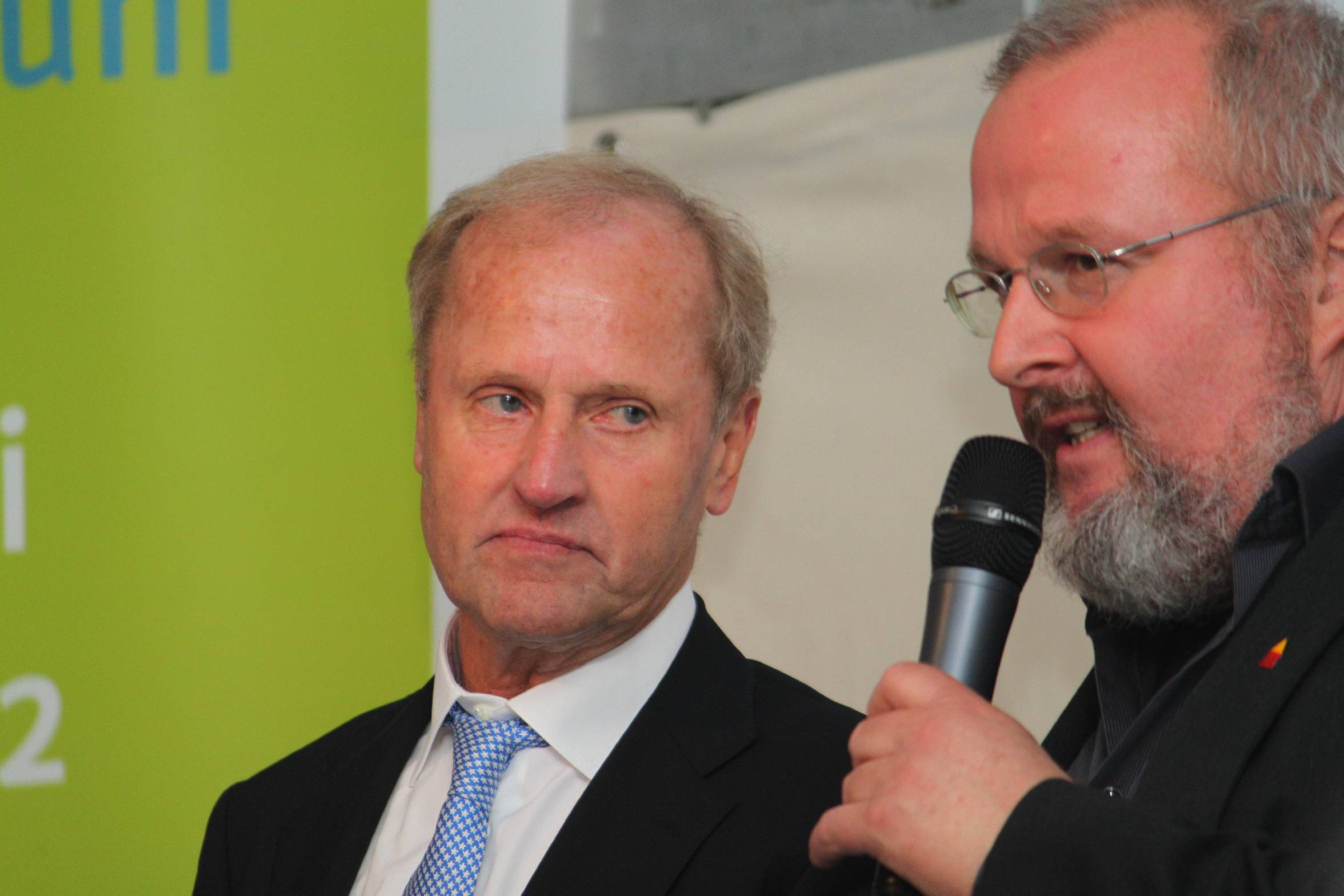 Der Unternehmer und Schinkenhersteller Jürgen Abraham (rechts) und Museumsdirektor Prof. Dr. Rolf Wiese (links) bei der Eröffnung des Agrariums.